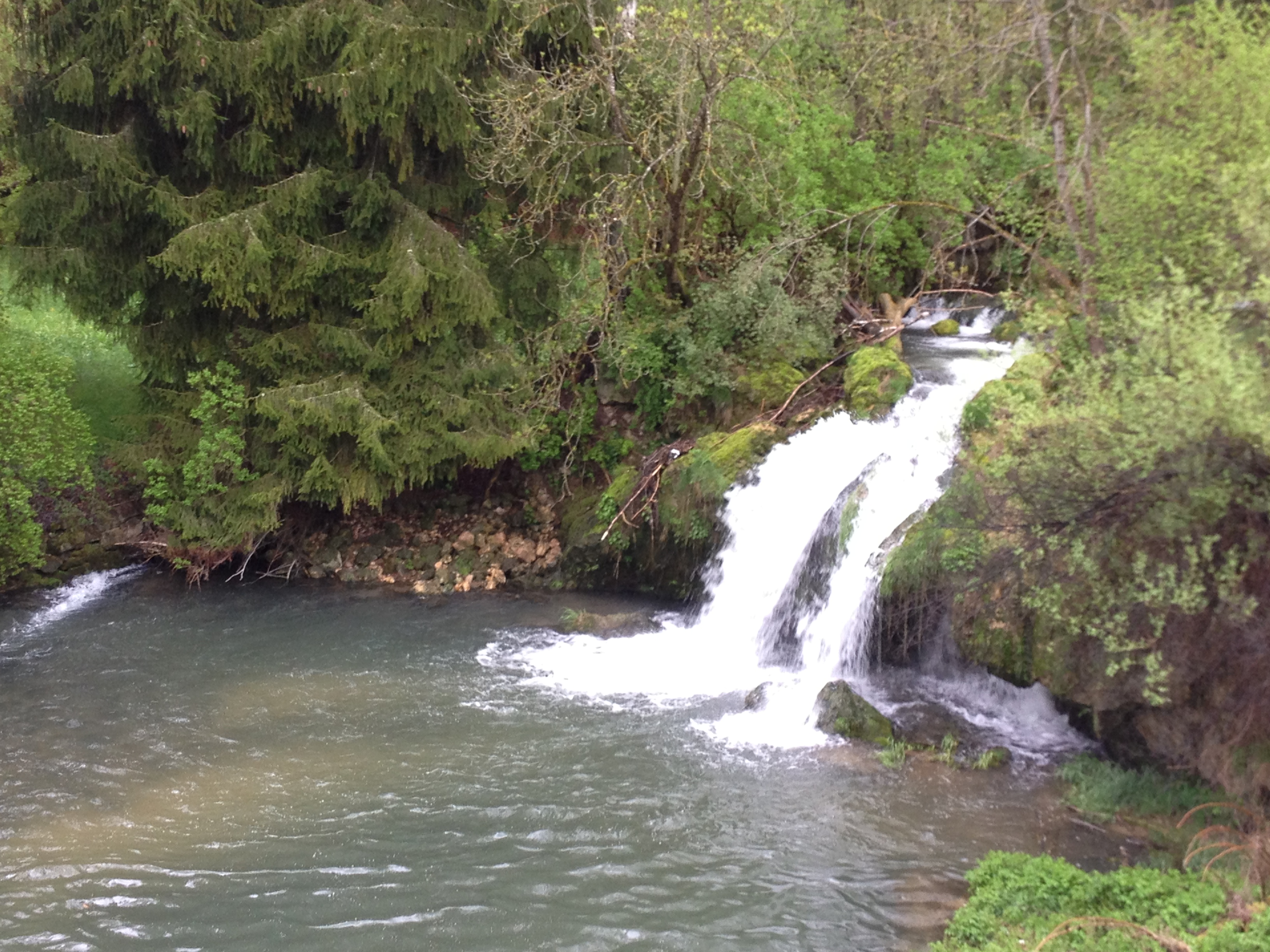 Wasserfall der Lauchert in Veringendorf